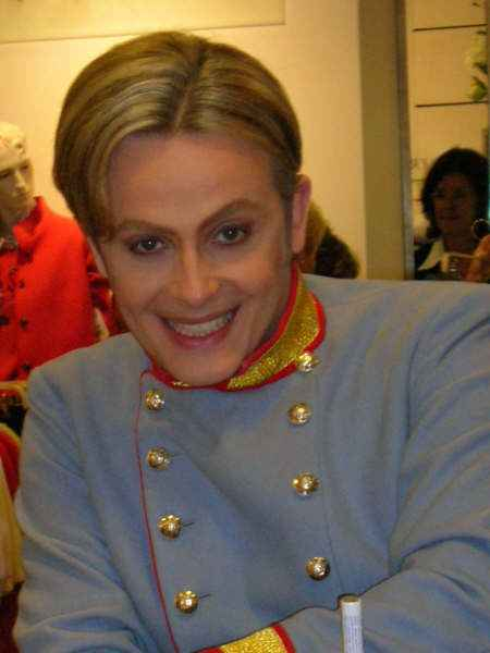 Ross Antony bei einer Autogrammstunde in Stuttgart als "Kronprinz Rudolf" ("Elisabeth")